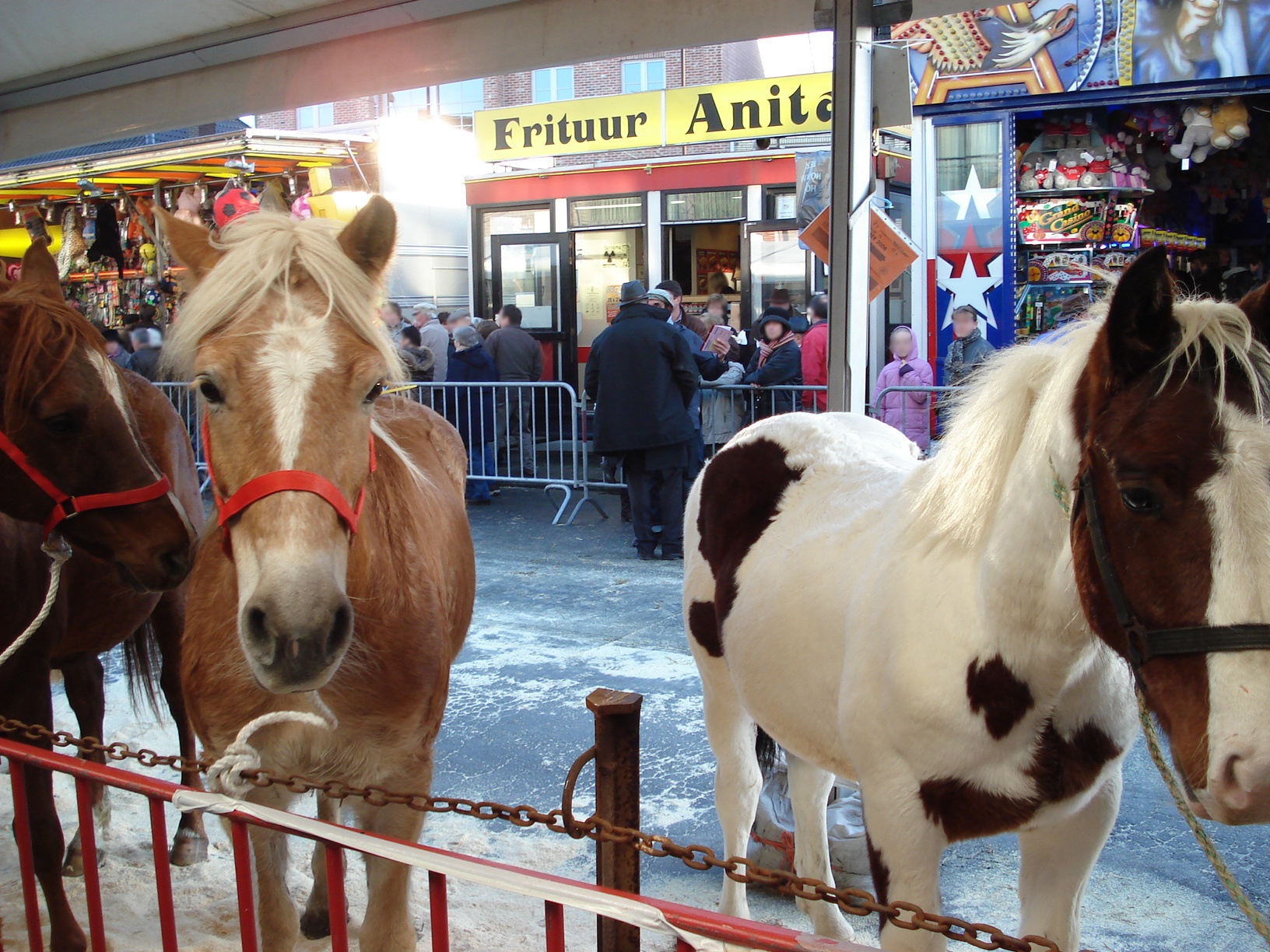 Sint-Lievens-Houtem (prov. Oost-Vlaanderen, België). Jaarmarkt 2008, sfeerbeeld.